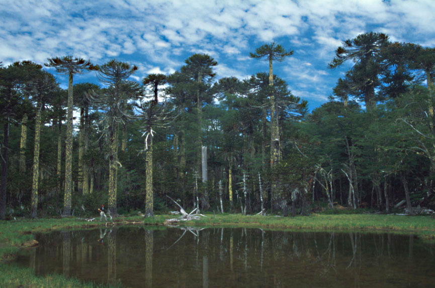 Bosque de Araucaria araucana, Laguna Los Patos, Sendero de los Lagunas, Parque Nacional Huerquehue, Region Araucania, Chile Autor: Roswo, Rosenwirth-Dia (own work) Original: KB-Dia